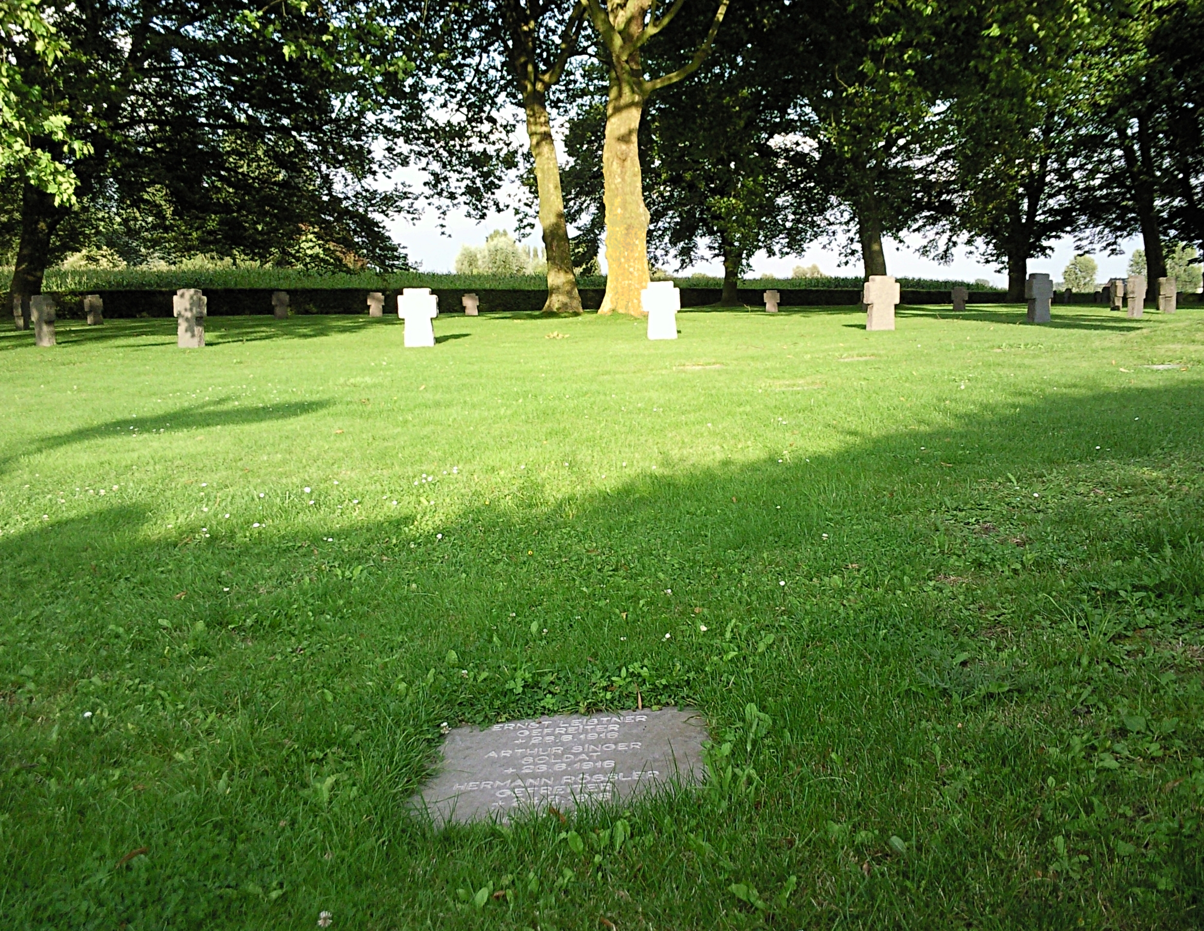 Cimetière militaire allemand de Verlinghem (Nord). 1157 soldats allemands tombés pendant la première guerre mondiale y reposent.